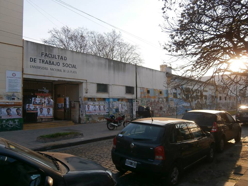 Facultad de Trabajo Social de la Universidad Nacional de La Plata, entrada principal sobre la calle 9. Fotografía: Eric Hamilton.